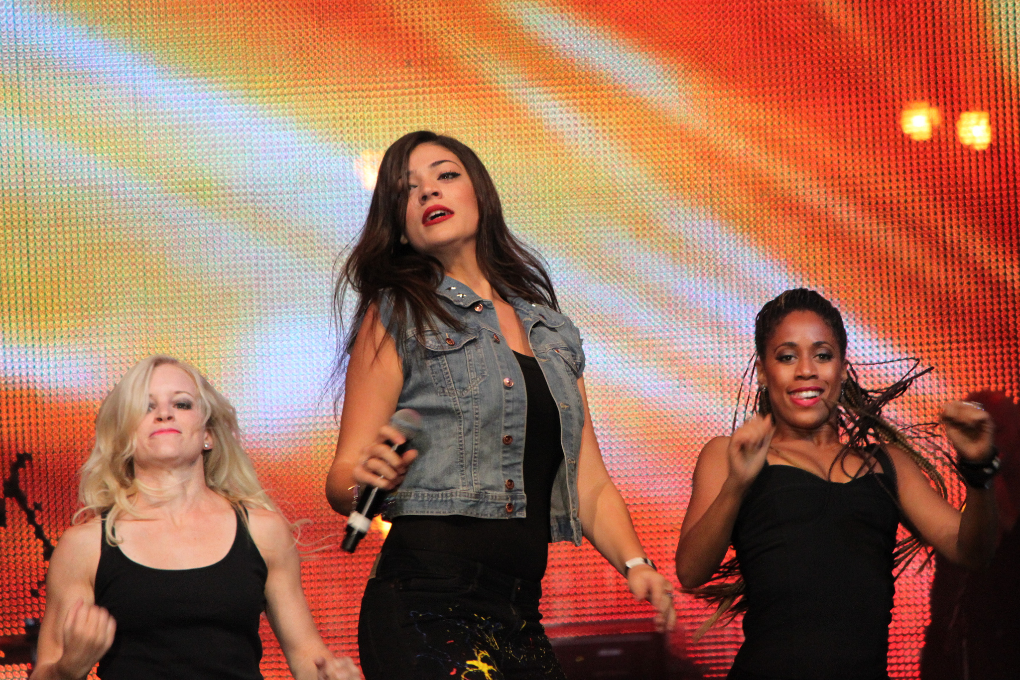 La cantante chipriota Ivi Adamou en el Stockholm Pride 2012.